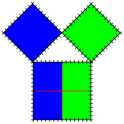 Suite de la figure précédente : le côté et la diagonale d'un carré ne sont pas commensurable.